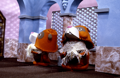 Myra & Martha Hamster uit de Fabeltjeskrant